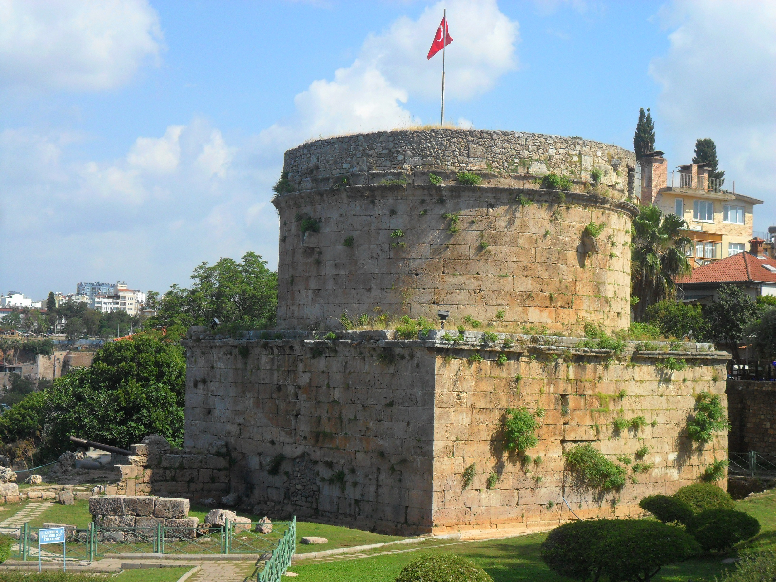 Hıdırlık Kulesi'nden bir görünüm.